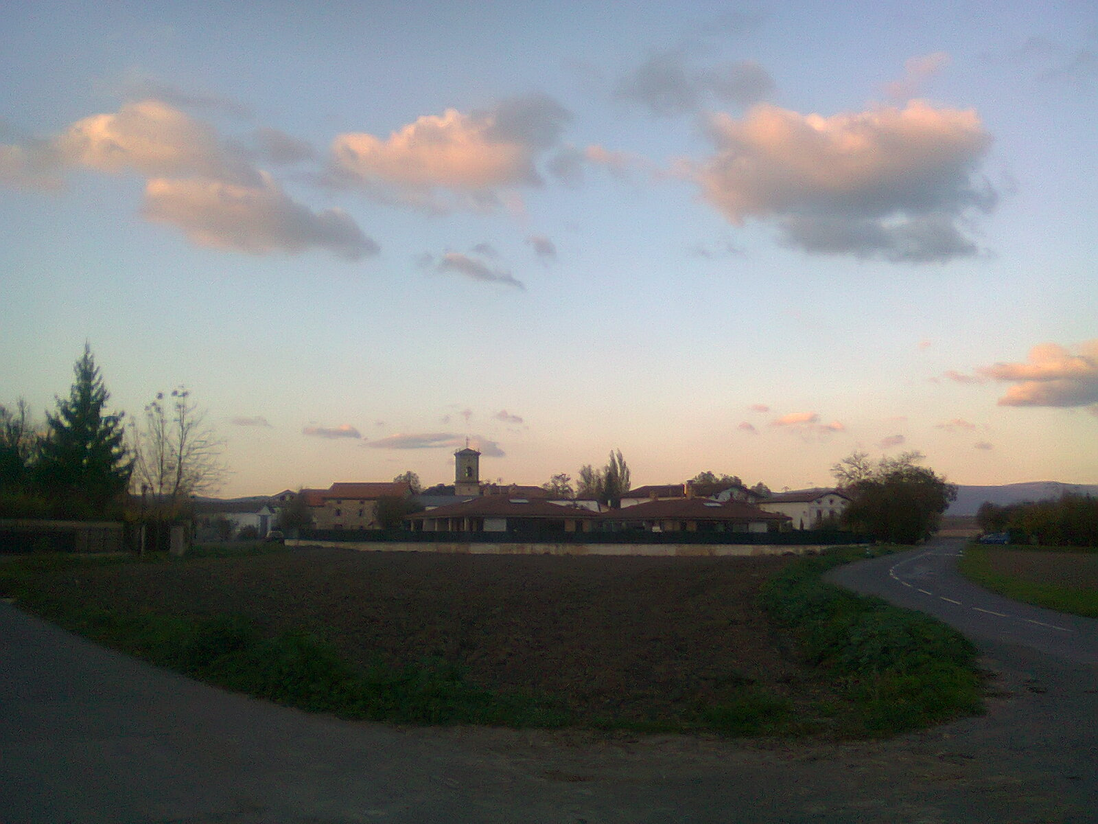 Junguitu (Álava, España)